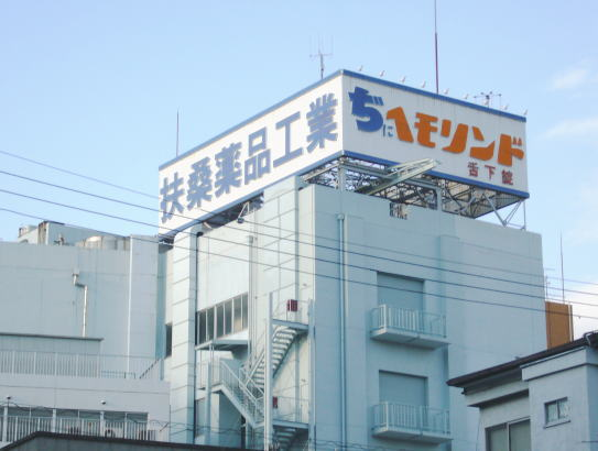 扶桑薬品工業城東工場